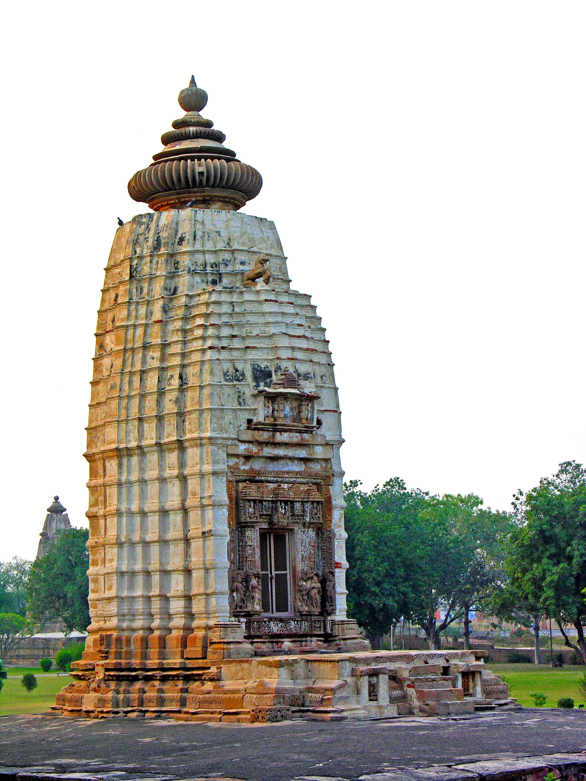 India-5752